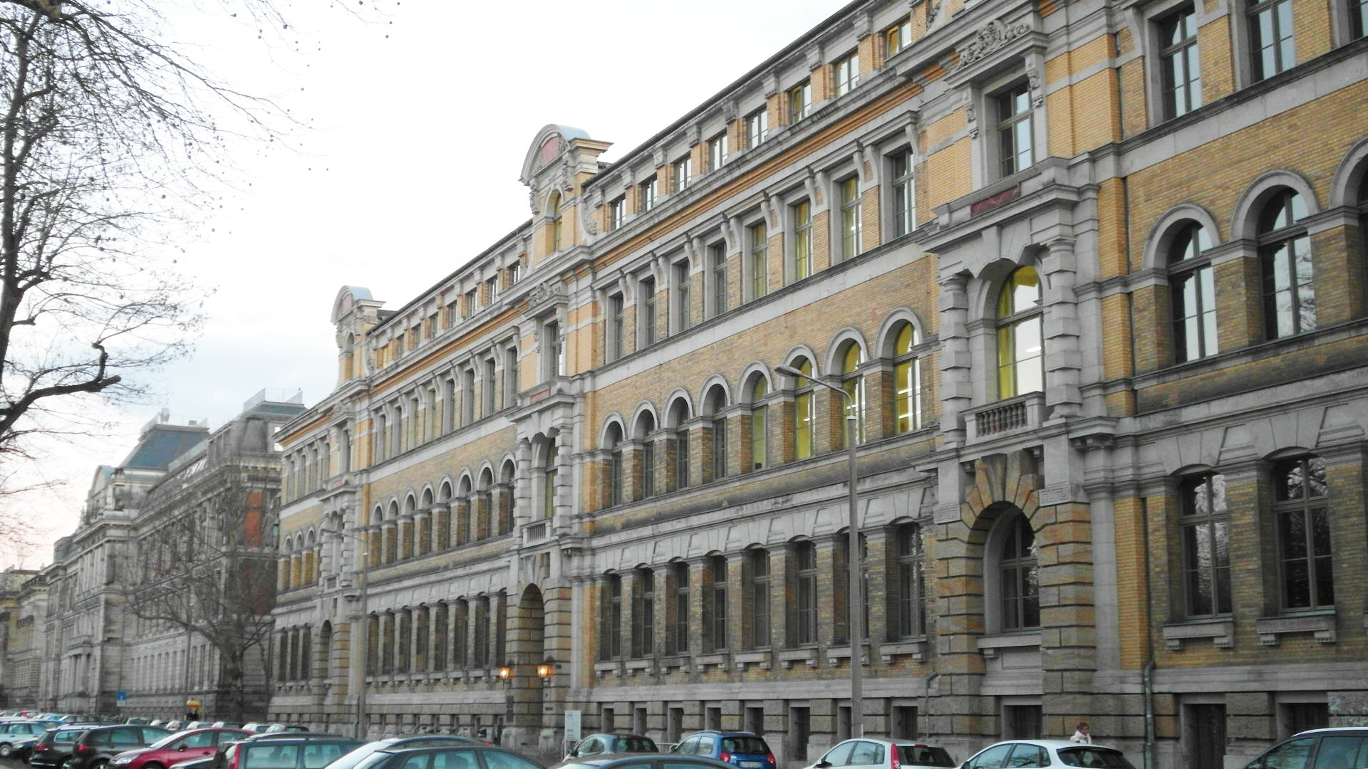 Leipzig, Wächterstraße 11 (Hochschule für Grafik und Buchkunst, HGB) und Wächterstraße 13 (Hochschule für Technik, Wirtschaft und Kultur, HTWK: Wiener-Bau)